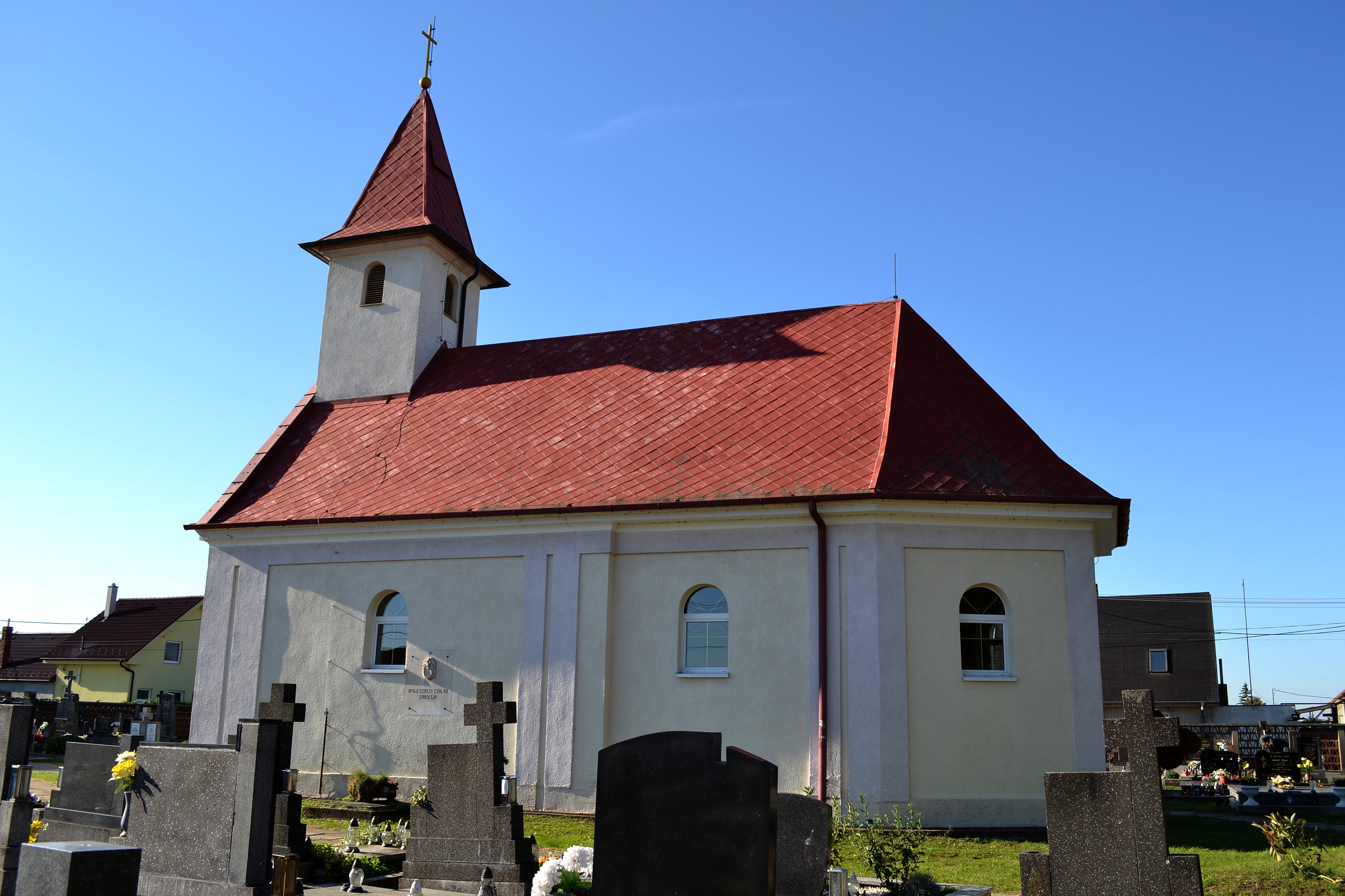 Opoj (okr. Trnava), Kostol Najsvätejšej Trojice; celkový pohľad